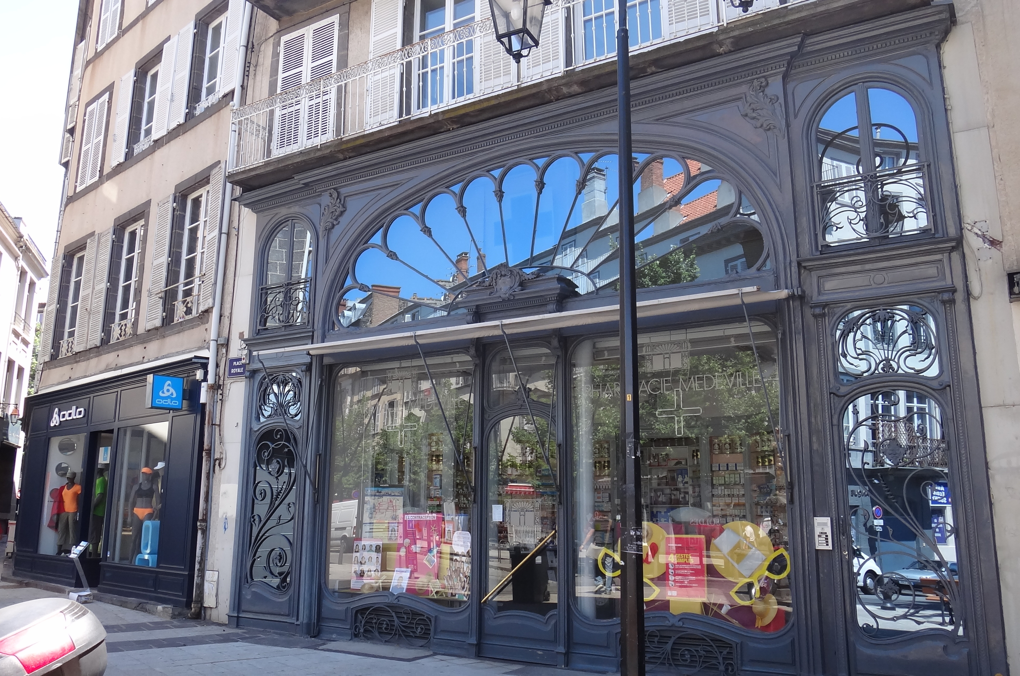 Pharmacie 1 Place Royale, Clermont-Ferrand .